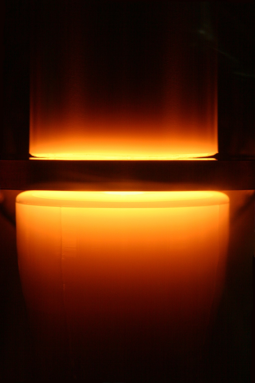 Wachsender Siliziumkristall nach dem Zonenschmelzverfahren